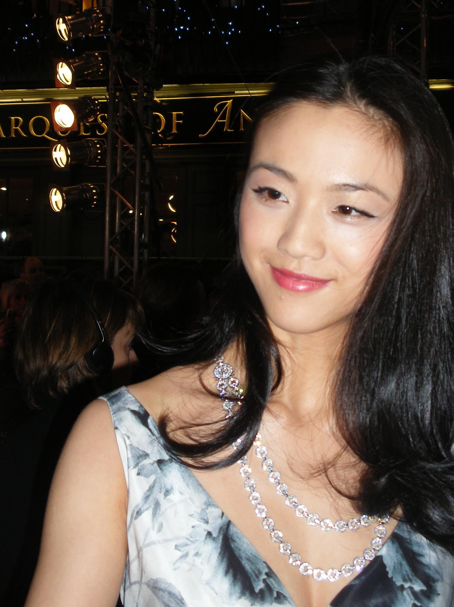 Tang Wei